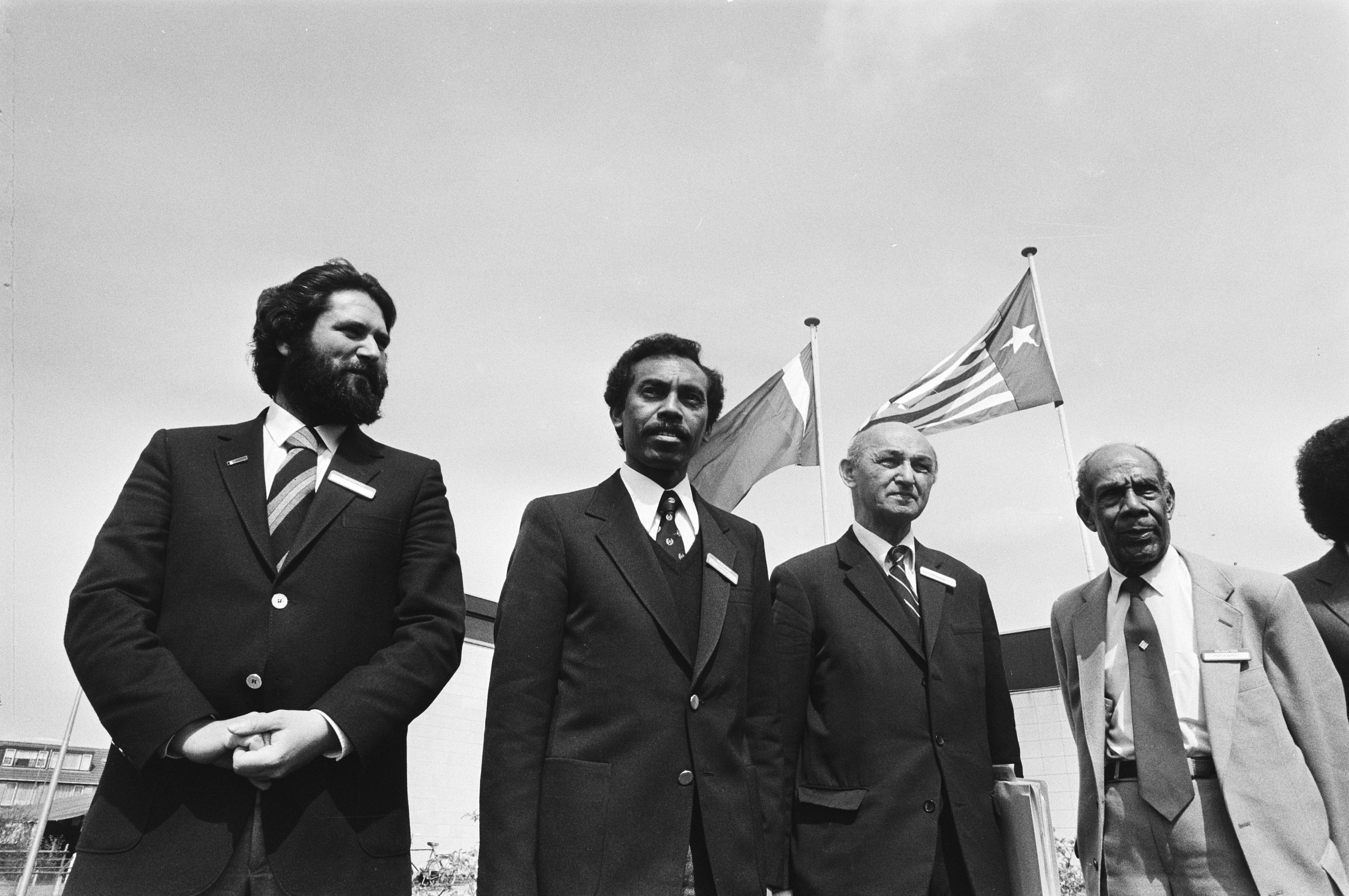 Collectie / Archief : Fotocollectie Anefo Reportage / Serie : [ onbekend ] Beschrijving : Conferentie in Capelle aan de IJssel (tot ondertekening) bondgenootschappelijk verdrag tussen Zuid-Molukkers, Oost-Timorezen en Papoeas uit West-Irian Datum : 24 april 1981 Locatie : Capelle aan den IJssel, Indonesië, Indonesië, Molukken, Nieuw-Guinea, Oost-Timor Trefwoorden : conferenties, verdragenen Persoonsnaam : Lilypaly Ayamiseba (Papua), Johan Manusama (Republik Maluku Selatan), Jacob Xavier (Timor-Leste) Fotograaf : Dijk, Hans van / Anefo Auteursrechthebbende : Nationaal Archief Materiaalsoort : Negatief (zwart/wit) Nummer archiefinventaris : bekijk toegang 2.24.01.05 Bestanddeelnummer : 931-4476